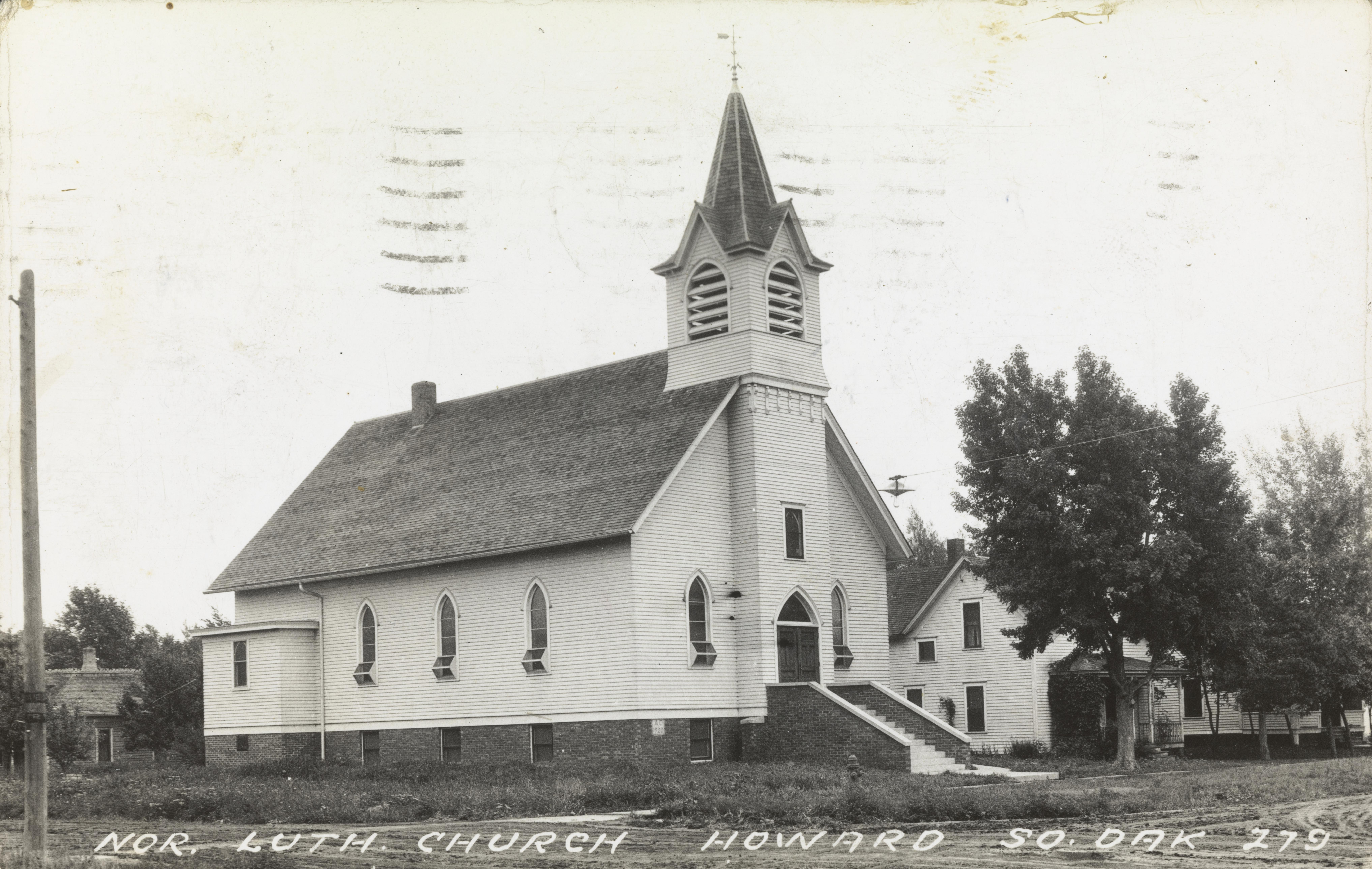 Bildet er hentet fra Nasjonalbibliotekets bildesamling Miner County, South Dakota